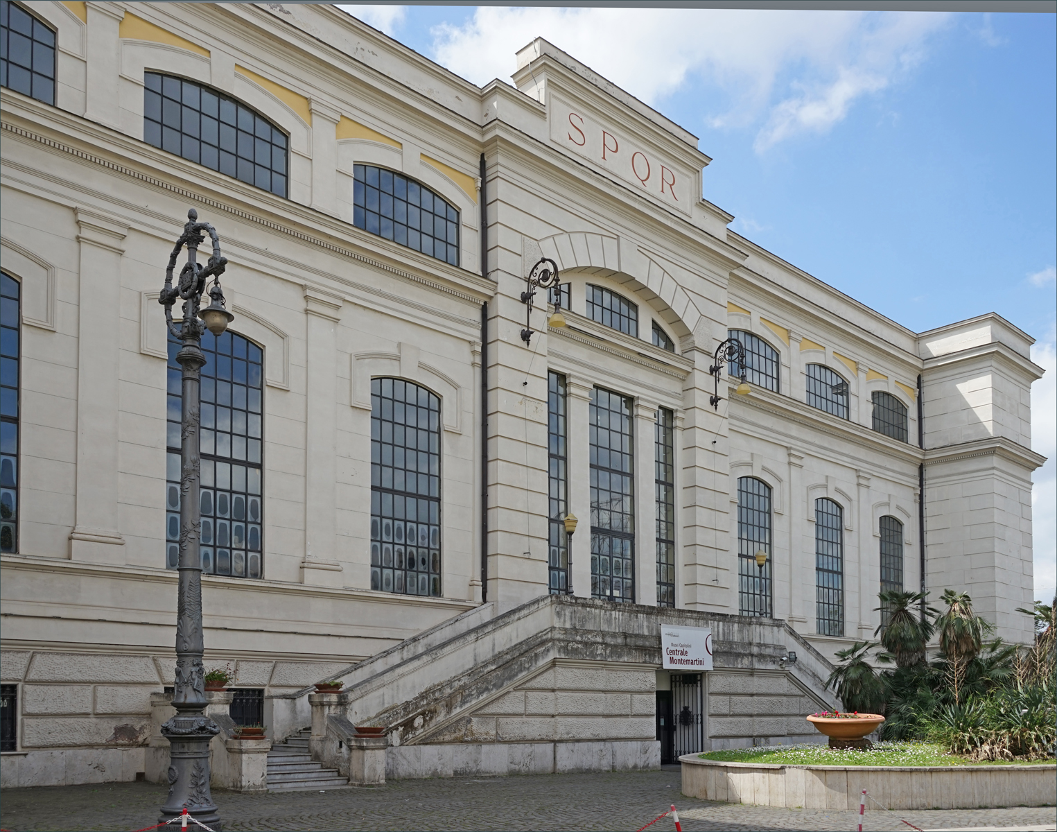 Façade du musée Le centre d'exposition des musées du Capitole dans l'ancienne centrale thermoélectrique Giovanni Montemartini à Rome est un exemple étonnant d'un site industriel transformé en musée. Il a ouvert en 1997 avec l'installation de centaines de sculptures antiques. Cette centrale électrique, mise en fonctionnement au début des années 1900, a été la première à Rome. Site de la Centrale Montemartini (Rome)